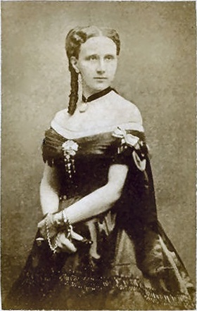 Luise, Großherzogin von Baden